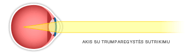 Akis su trumparegystės sutrikimu